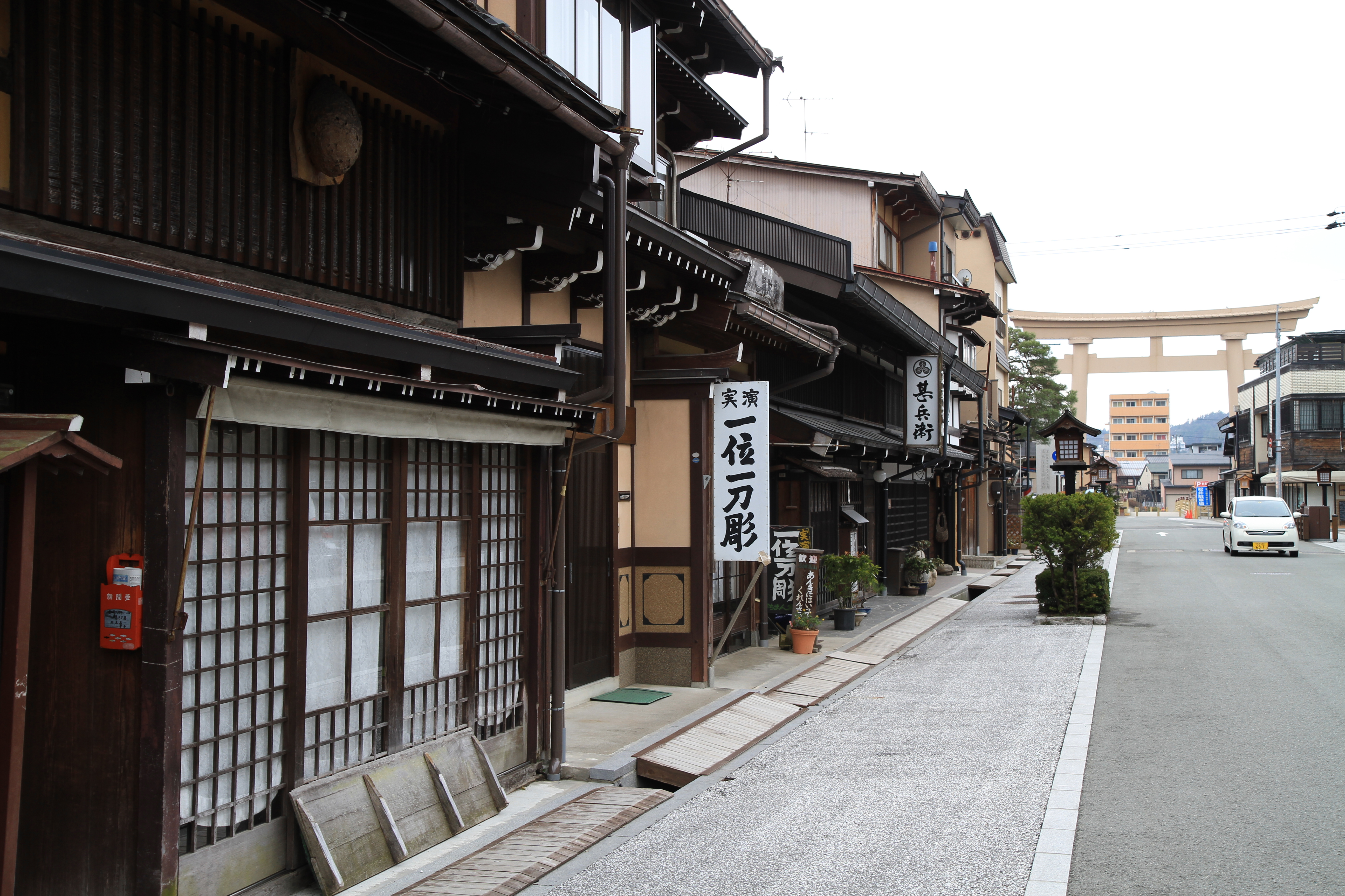 実演一位一刀彫 (岐阜県高山市)